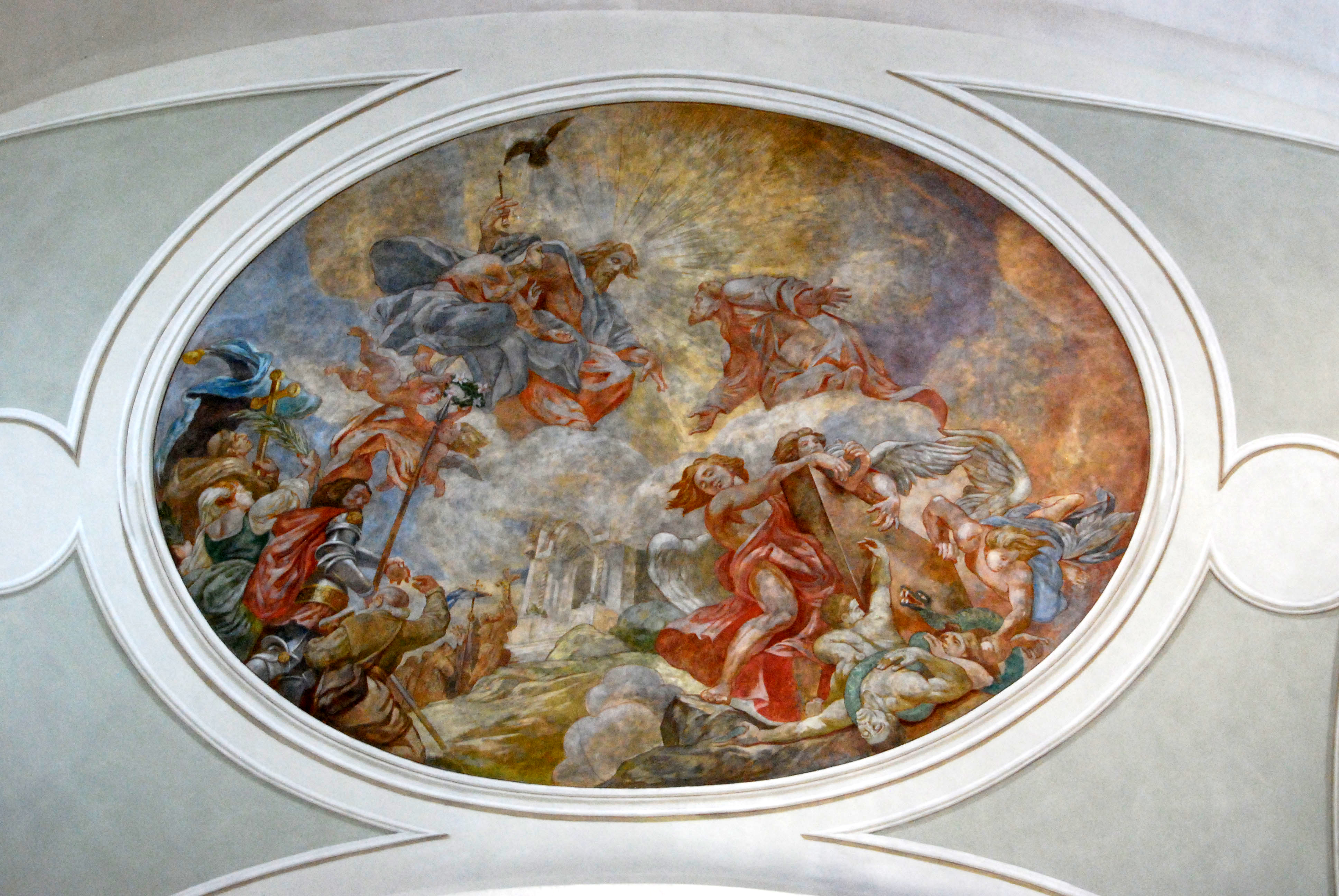 Tardos Krenner Viktor mennyezeti freskója az Alcantarai Szent Péter-templomban, 1894-es alkotás (Budapest, Ferenciek tere)